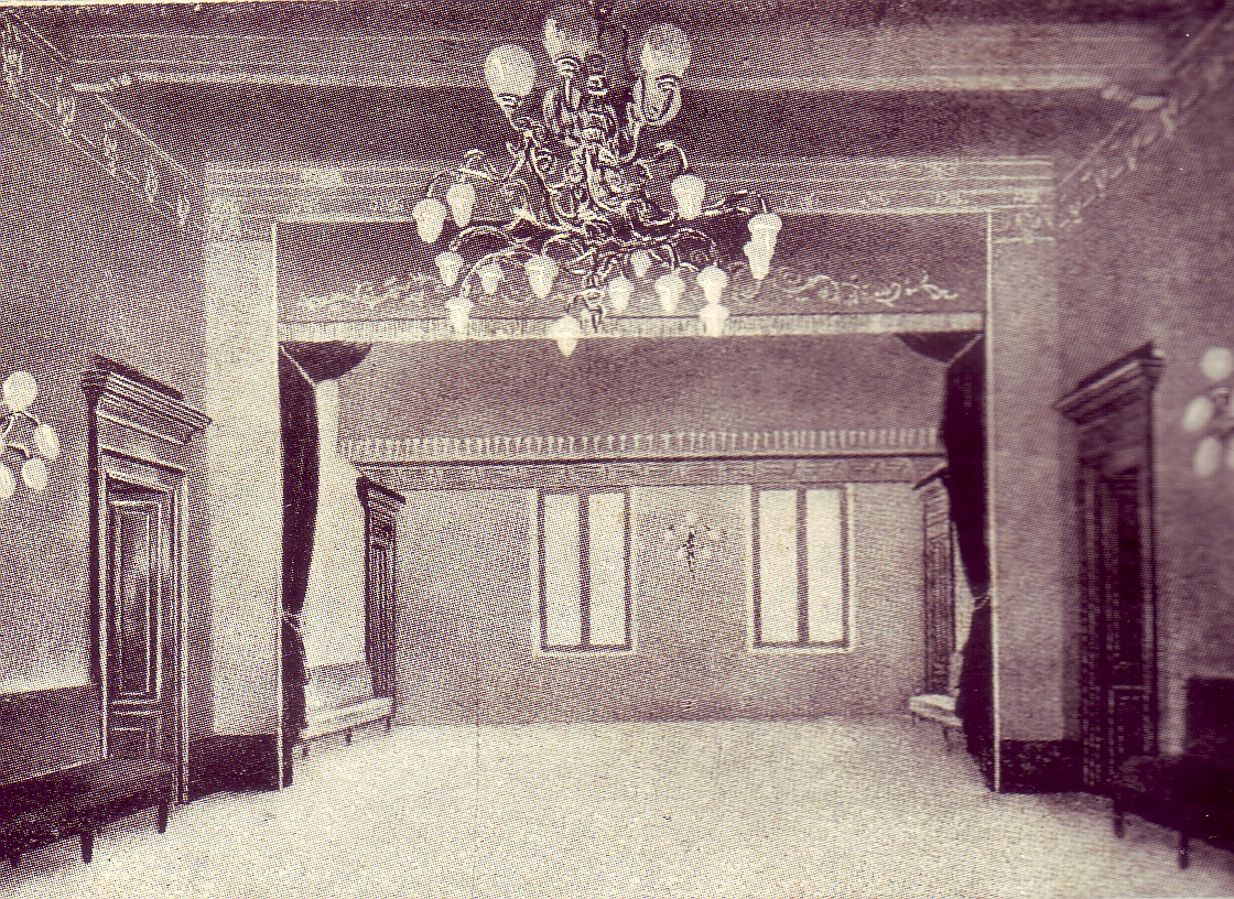 Sala dell'adunata del 23 marzo 1919, Piazza San Sepolcro a Milano.